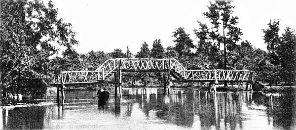 Passeio público de Curitiba - foto do início do século XX.